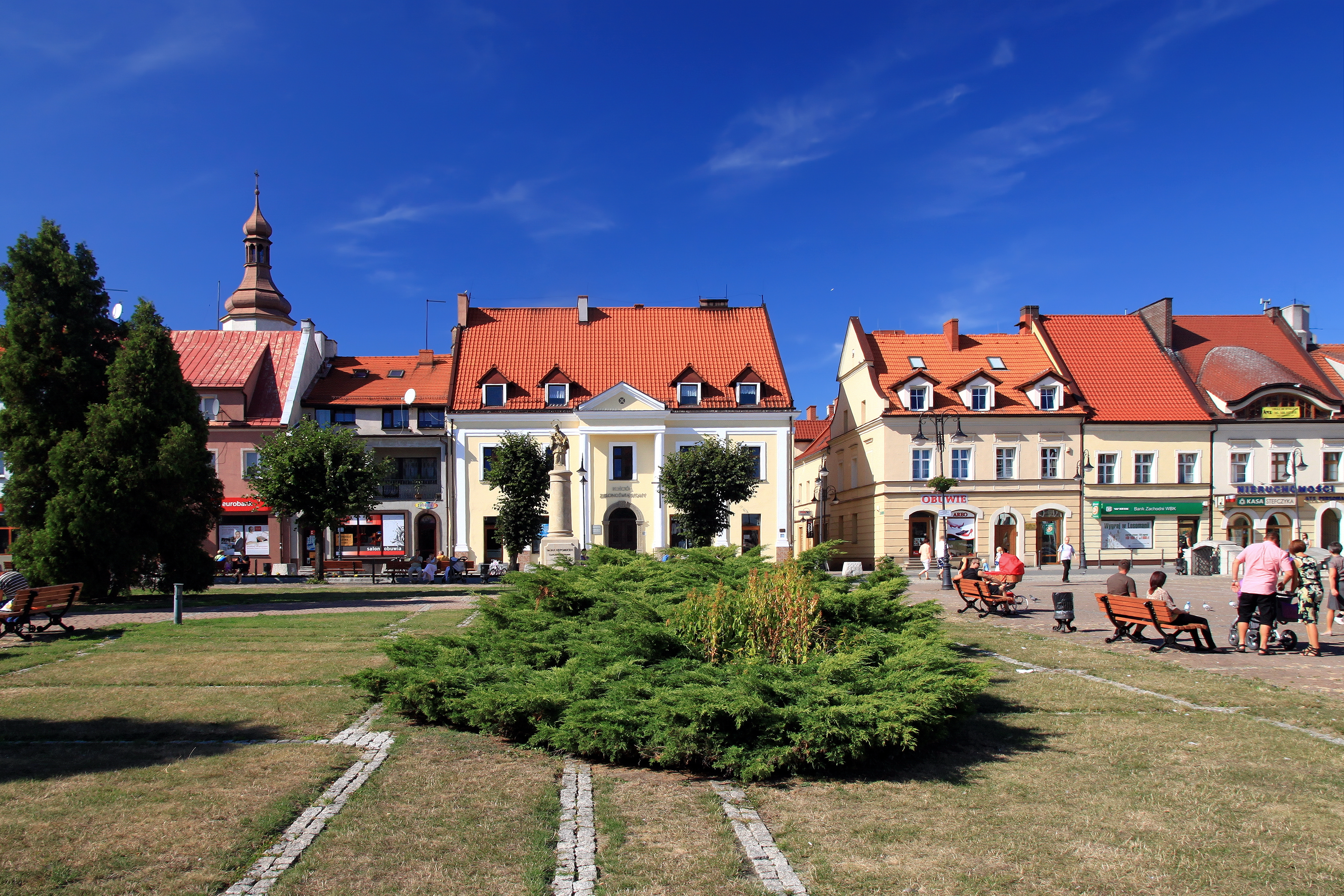 Żory, układ urbanistyczny